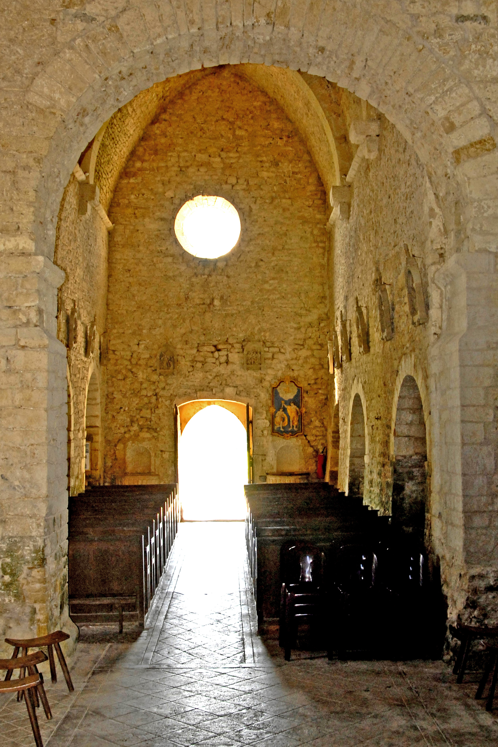 Saint-Hymetière, Schiff aus der Vierung